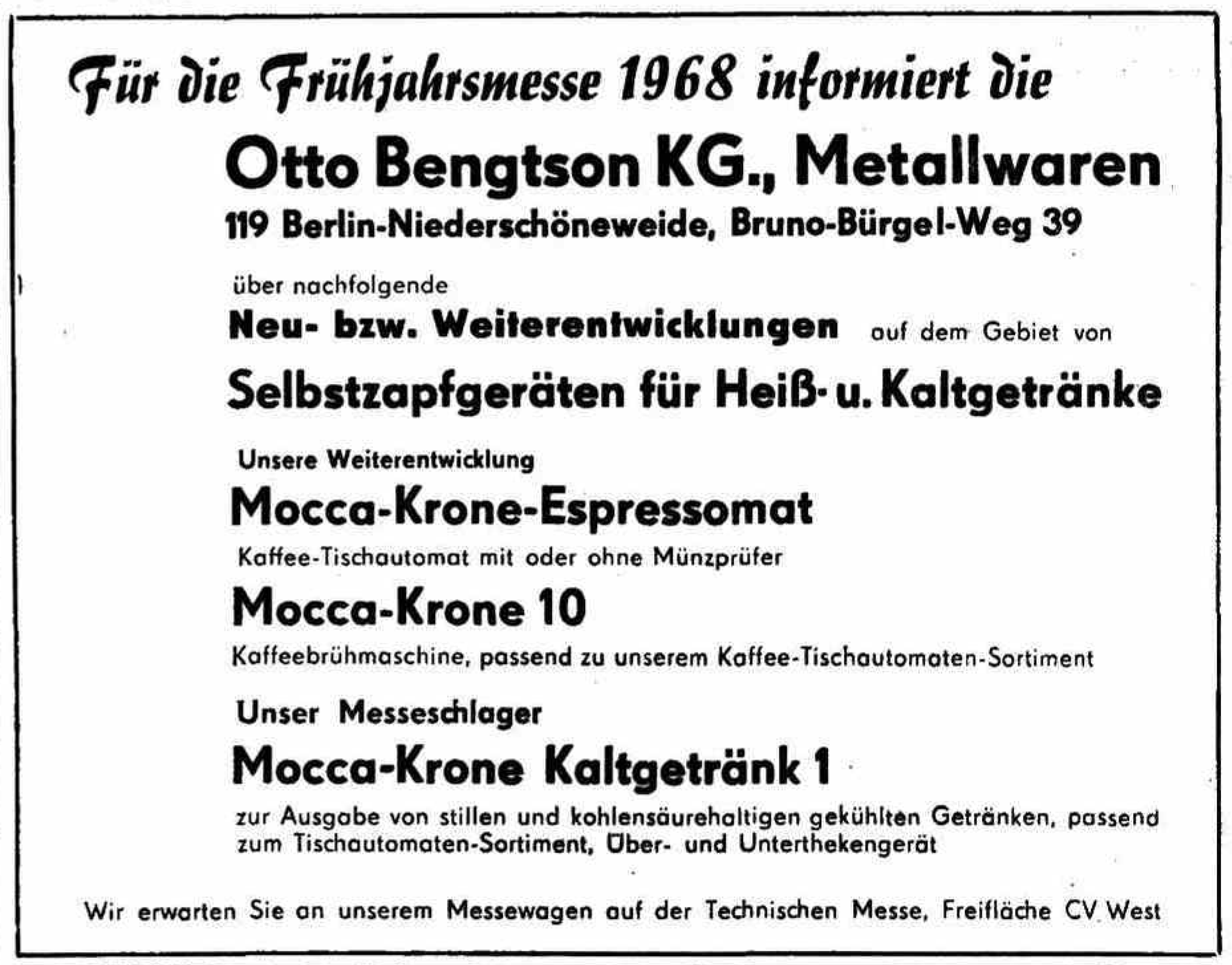 Zeitungsanzeige der Produkte der Otto Bengtson KG Metallwaren 1968 mit Typen der Mocca-Krone